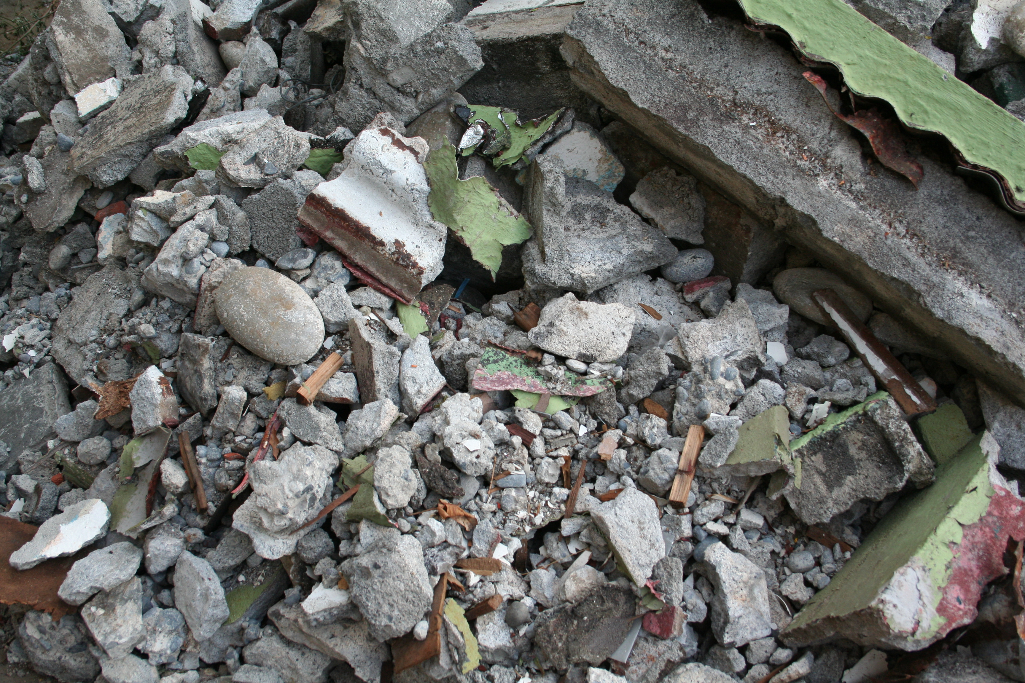 Des gravats sur un chantier de démolition, à La Réunion.